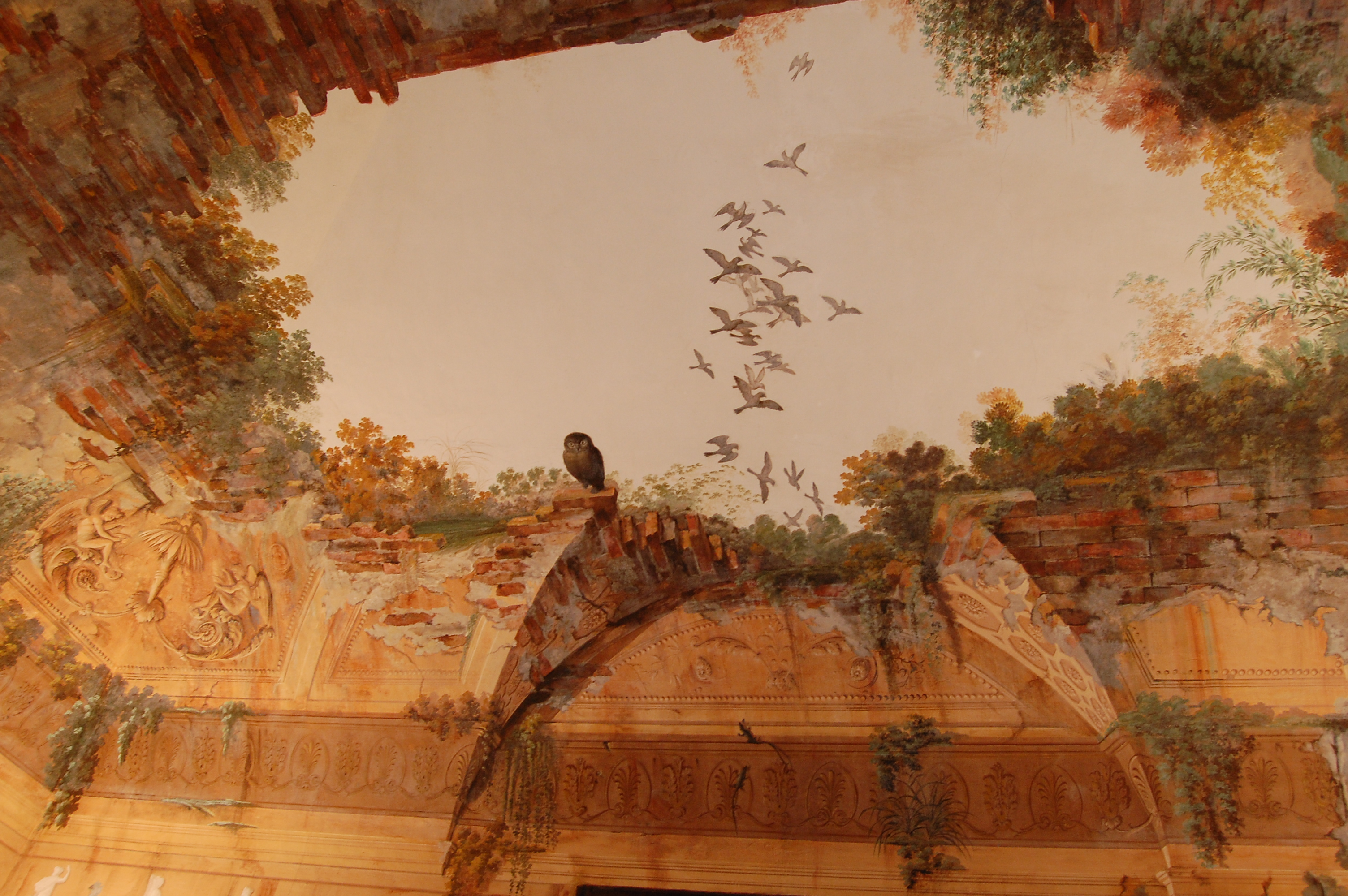 Palazzina cinese Riserva naturale Monte Pellegrino